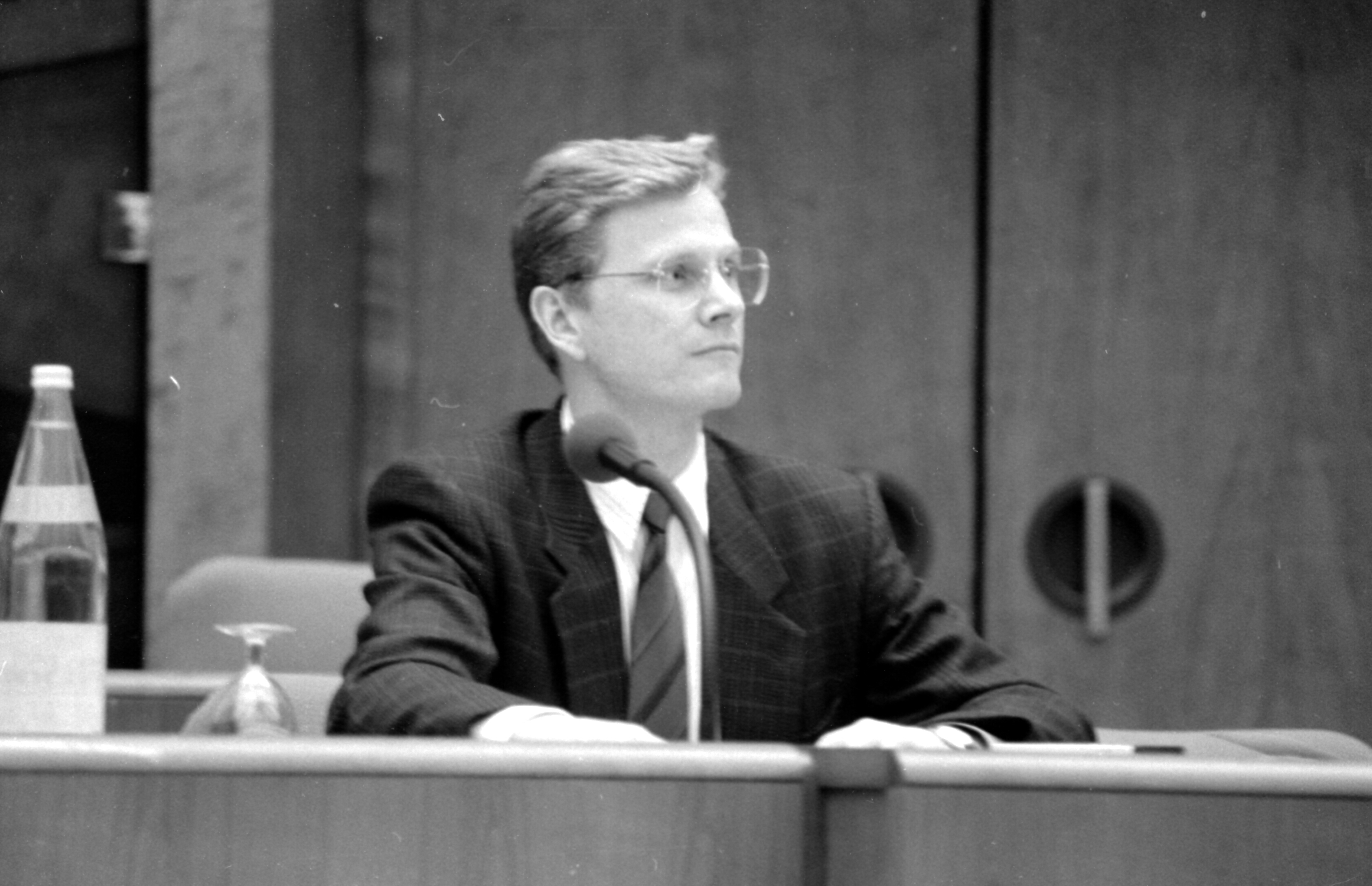 14. Bundeskongress der Jungen Liberalen vom 25.-27. November 1988 in Luxemburg